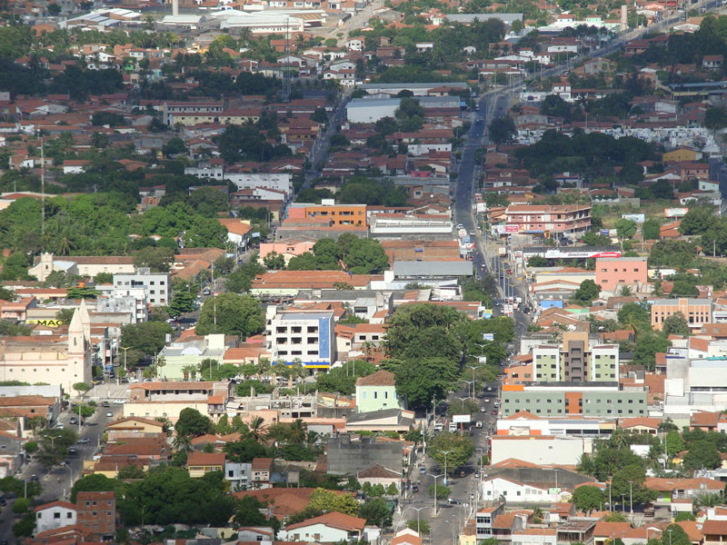 Imagem do centro da cidade de itapipoca, que nos últimos anos cresceu fortemente.